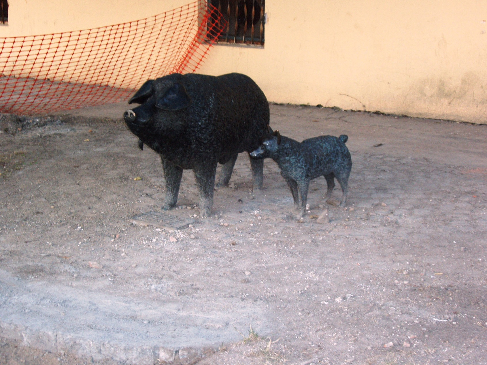 Spomenik - mangulica i pulin - u Sremskoj Mitrovici.